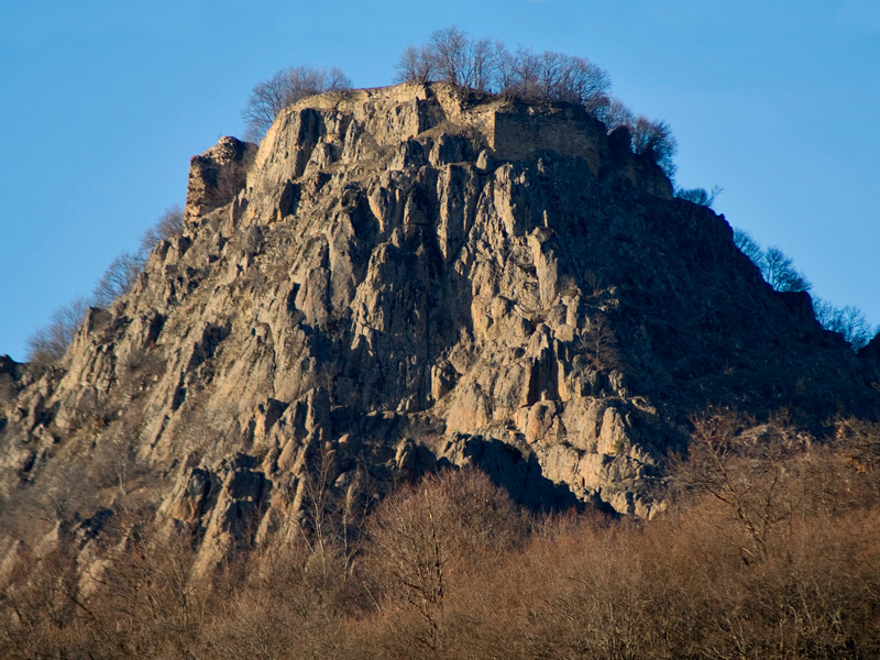 Тврђава Јелеч, фото: Бојан Миловић